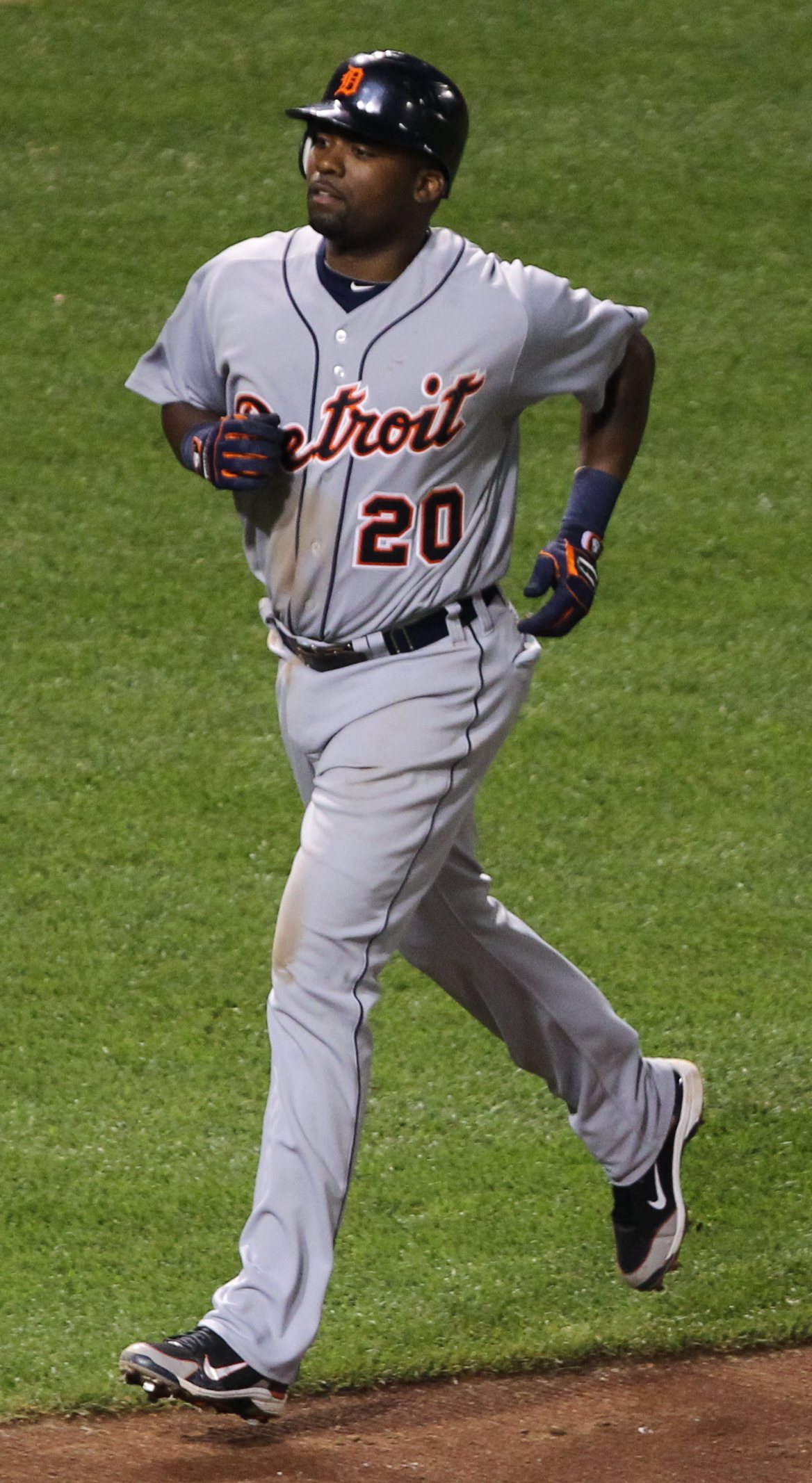 Wilson Betemit